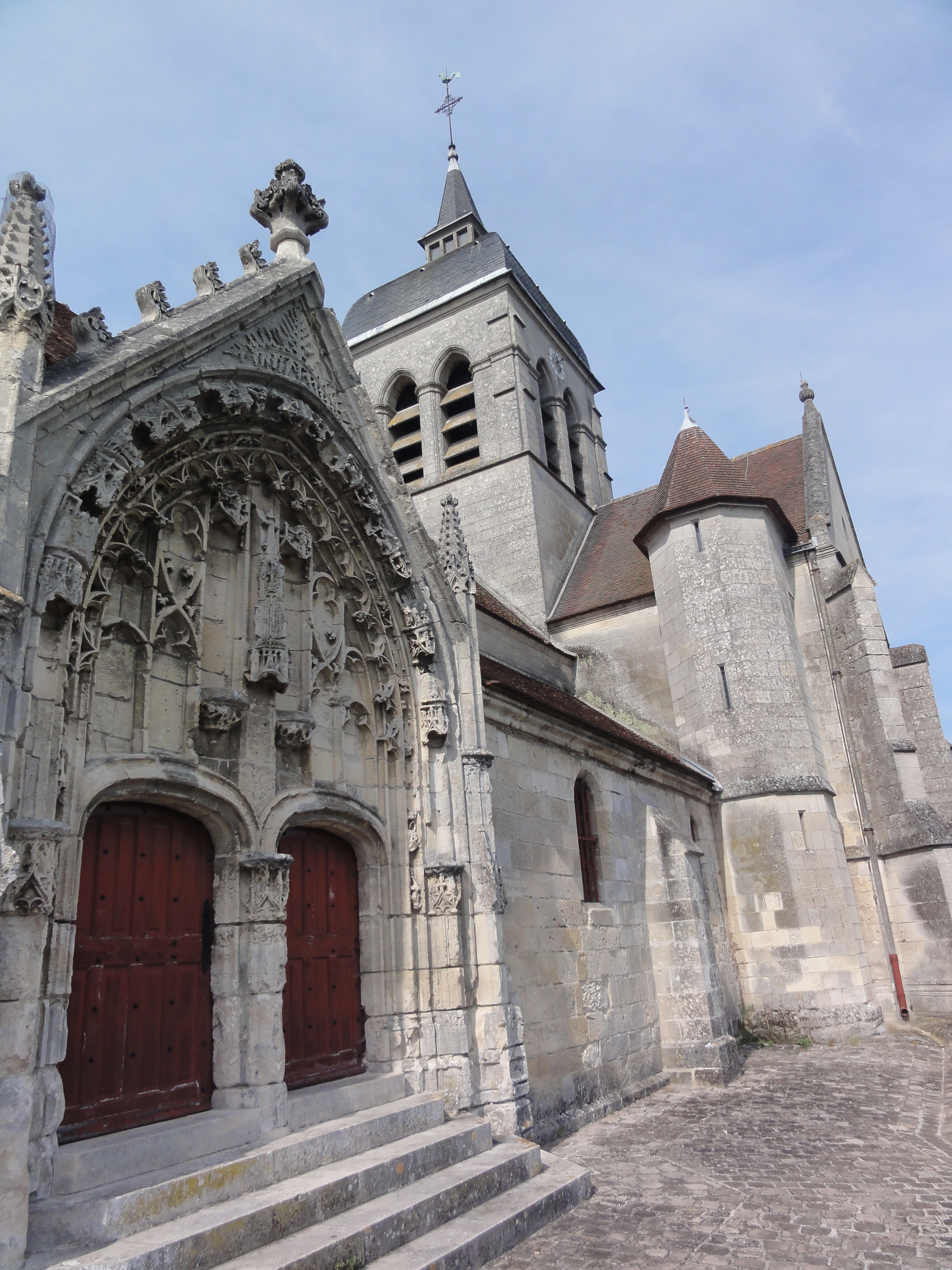 Église Sainte-Radegonde de Missy-sur-Aisne